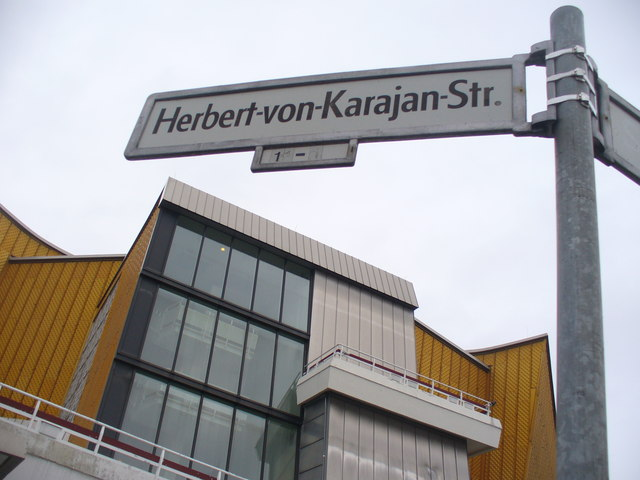 Herbert-von-Karajan-Strasse